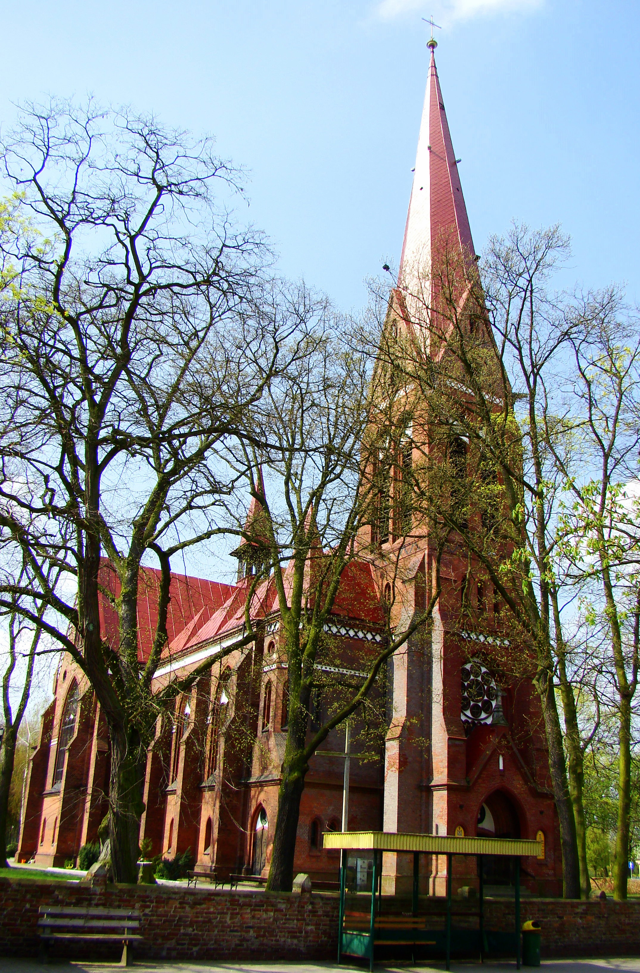 Kościół Niepokalanego Poczęcia NMP w Policach, Polska